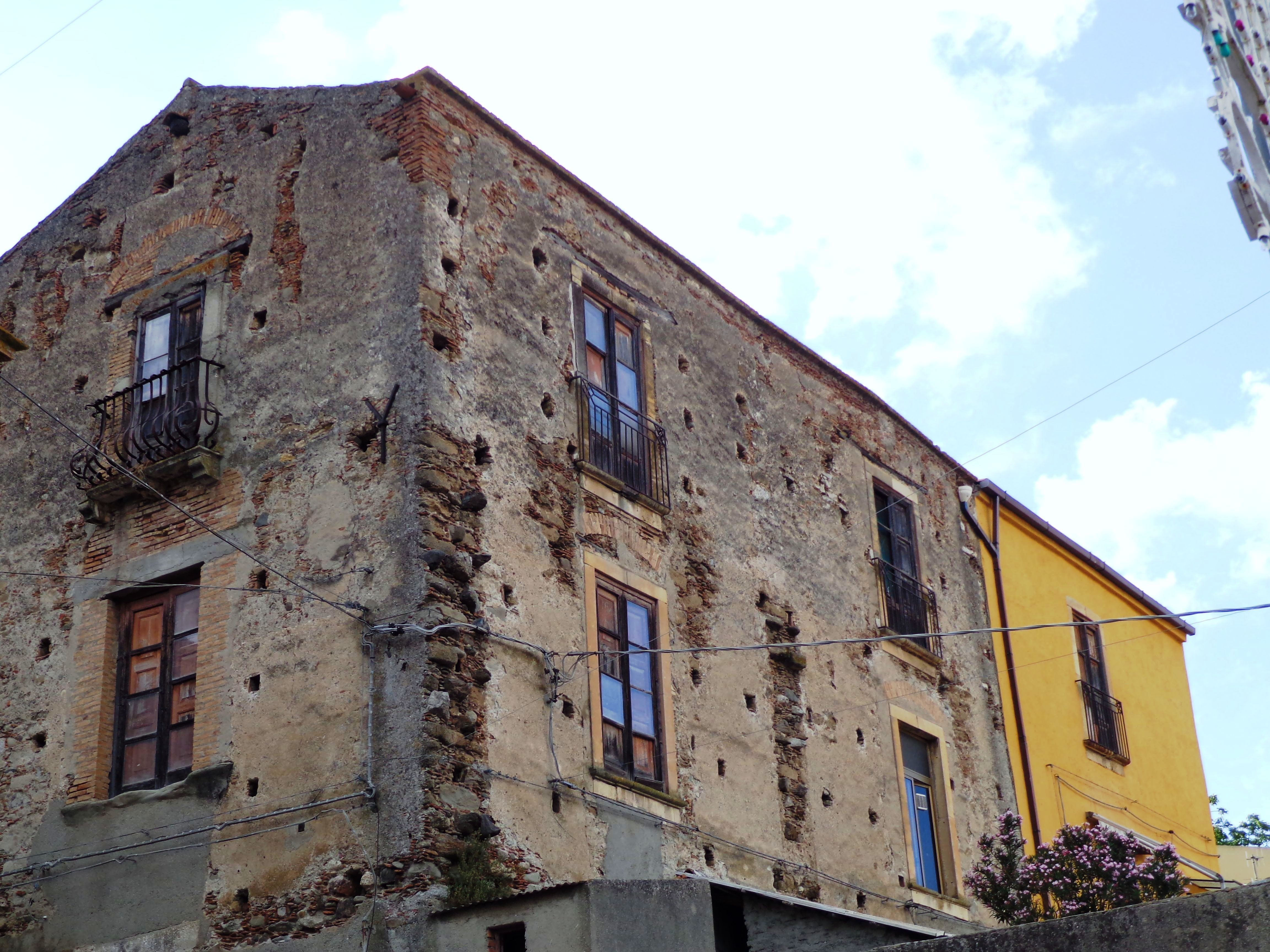 Condrò Castello